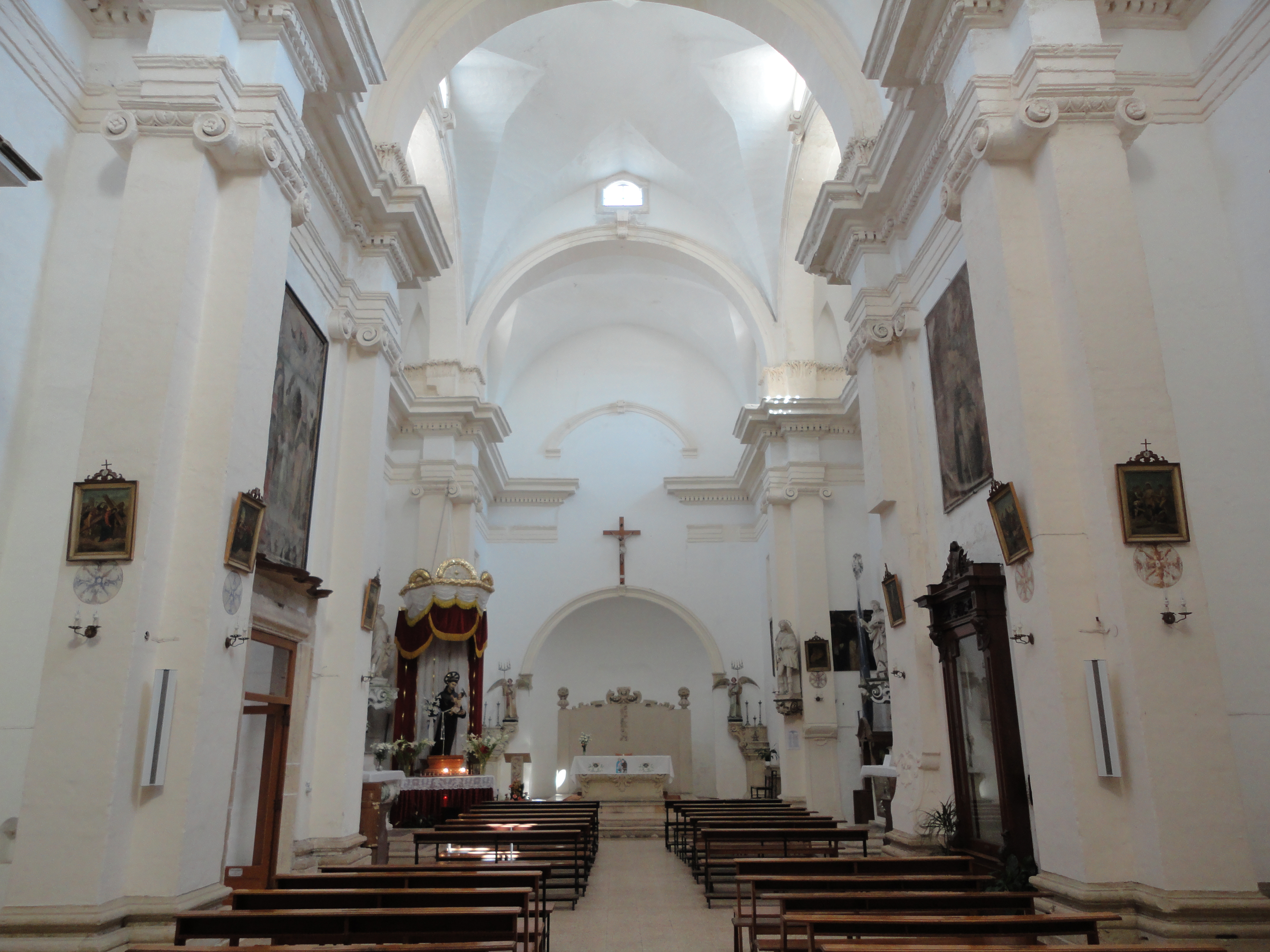 Interno Chiesa di San Sebastiano e San Rocco Galatone, Lecce